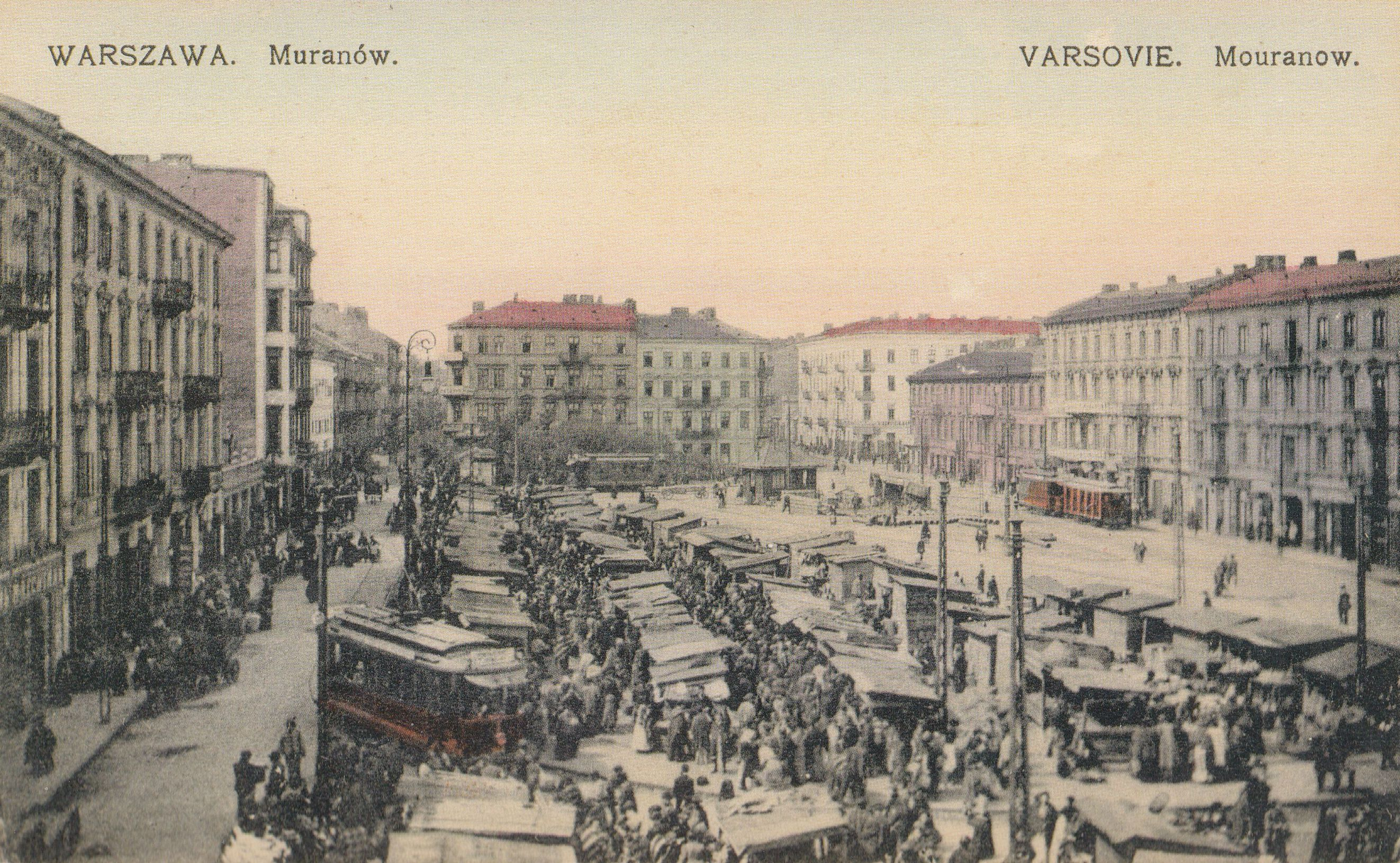 Plac Muranowski w Warszawie